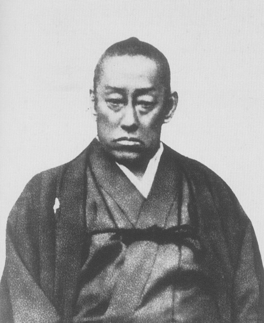 毛利敬親 Mouri Takachika.英国提督との記念写真より本人のみ抜粋した写真。